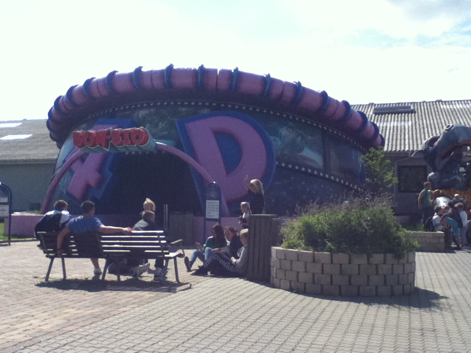 BonBon-Lands biograf BON-BIO 4D.